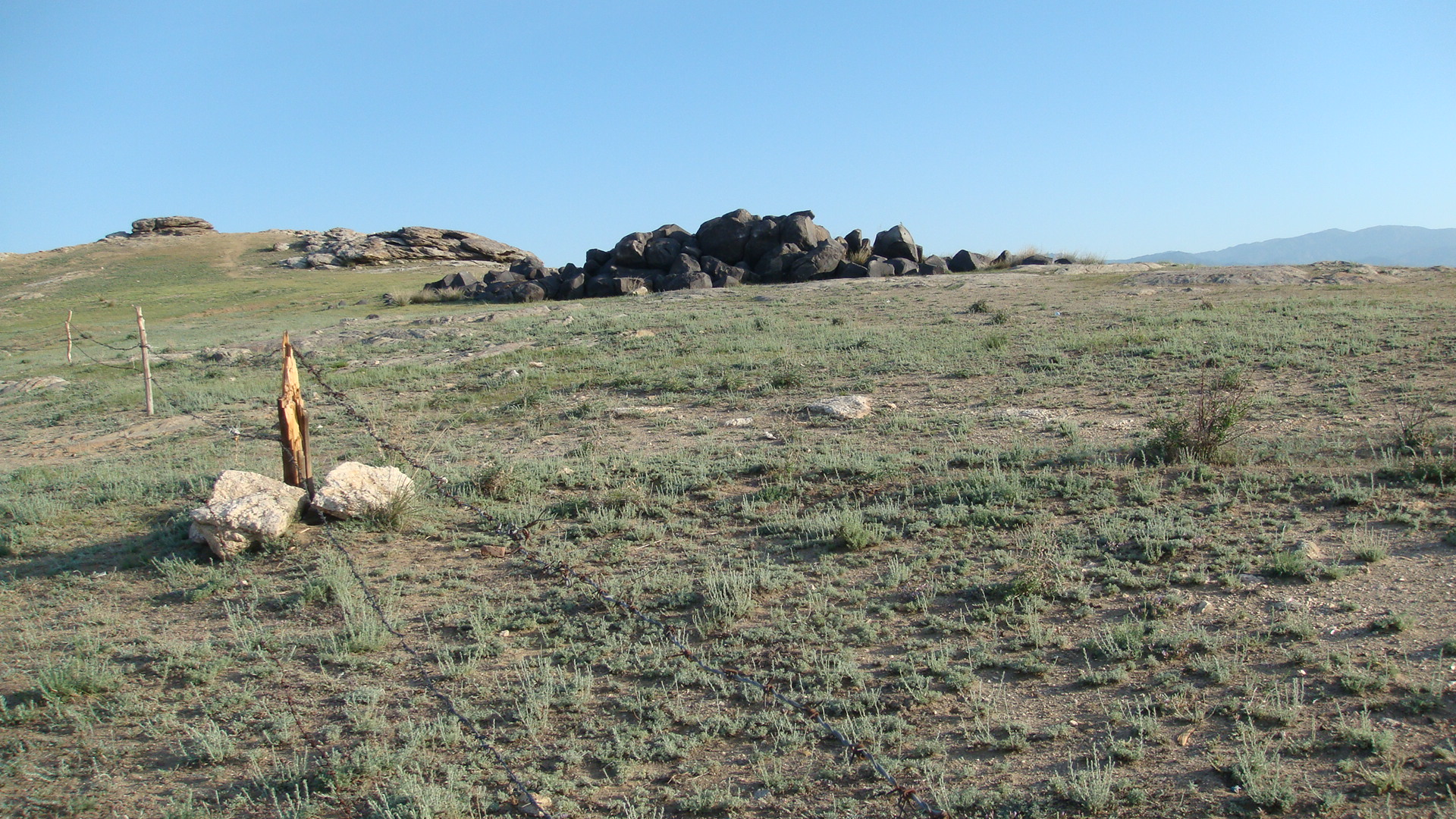 切木尔切克乡的陨石群 余华峰